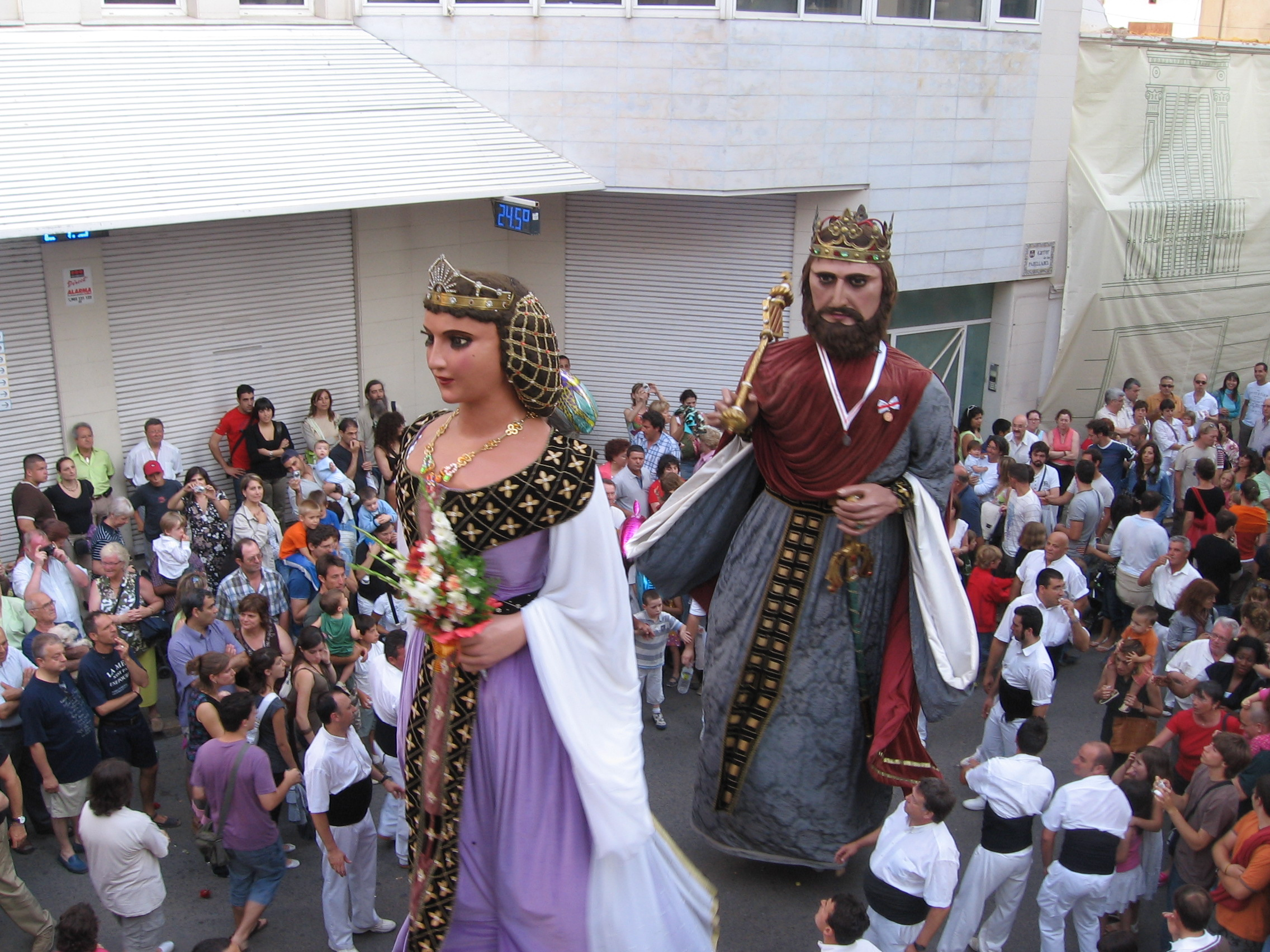 Imatge dels Gegants Vells de la Vila passant pel Cap de la Vila, en el cercavila de la vigília de Corpus. Sitges, 2007.